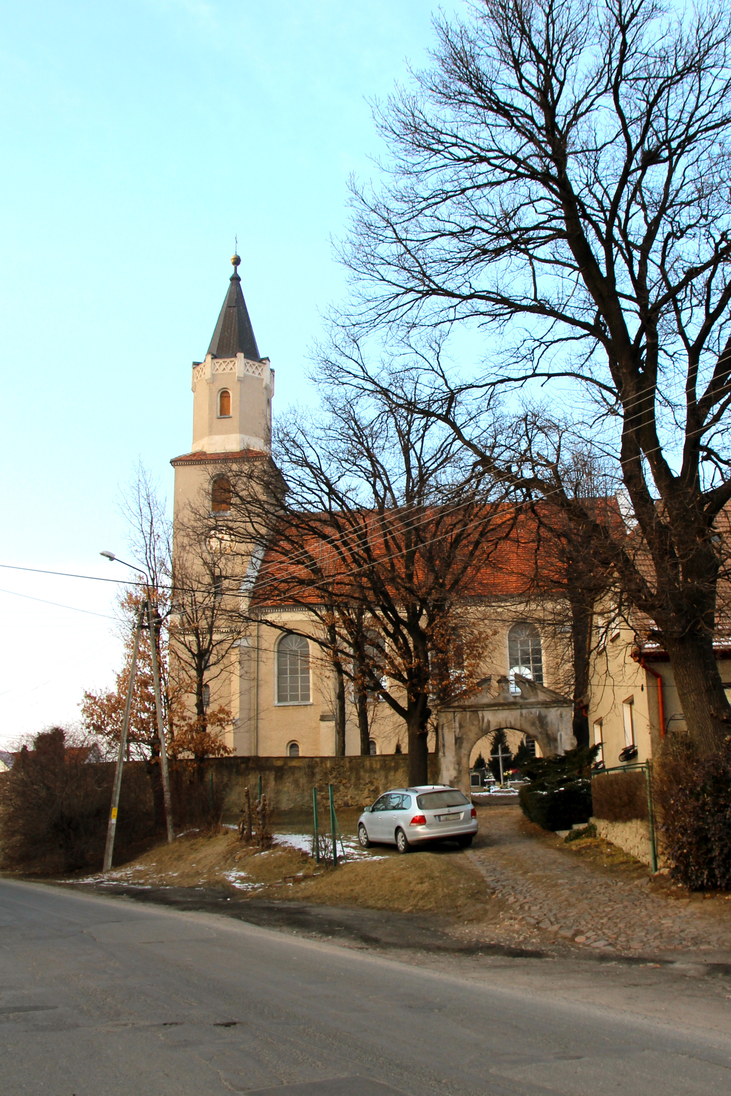 Ratajno – wieś w Polsce w województwie dolnośląskim, w powiecie dzierżoniowskim, w gminie Łagiewniki.